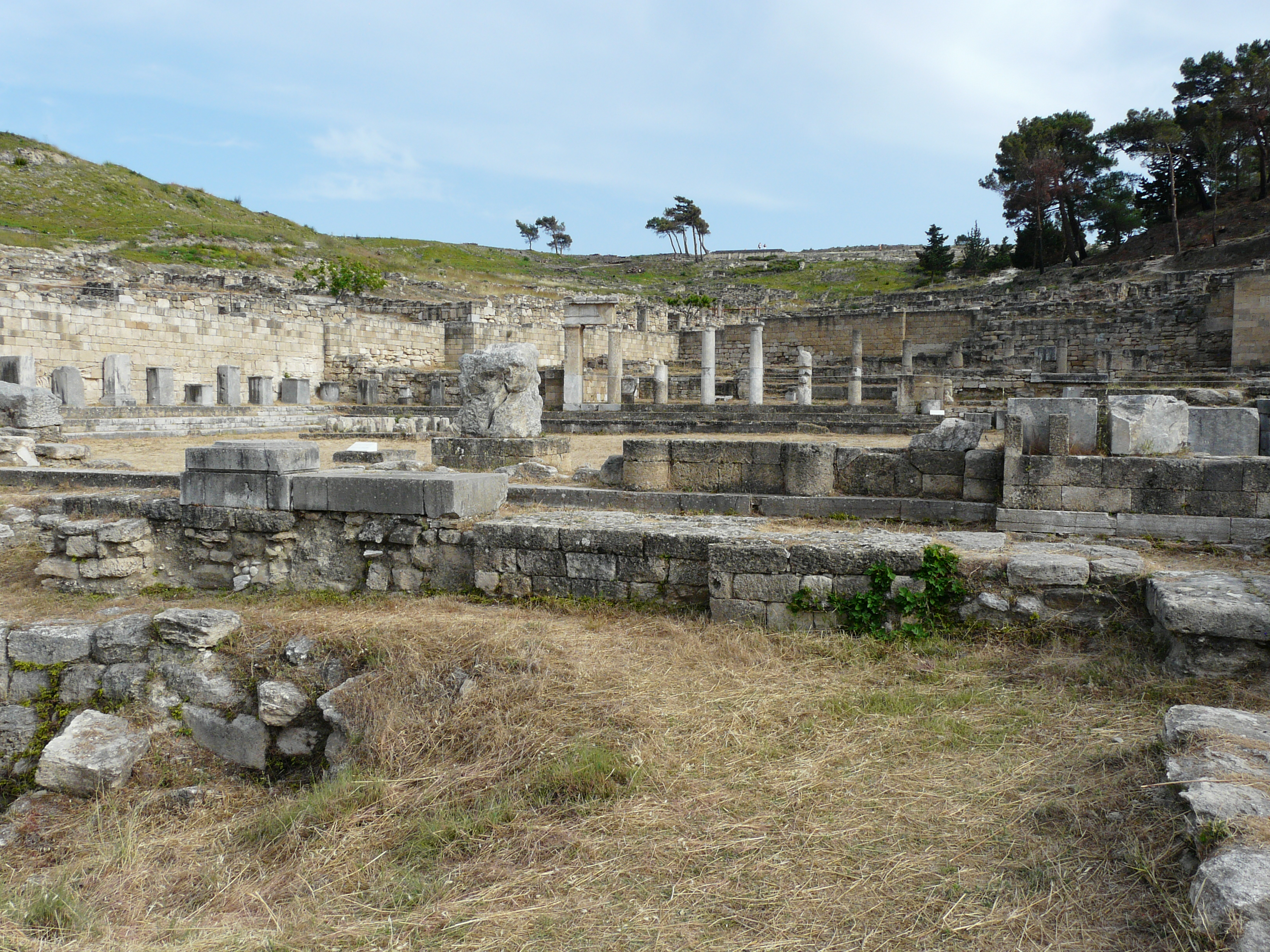 Kamiros, Rhodes